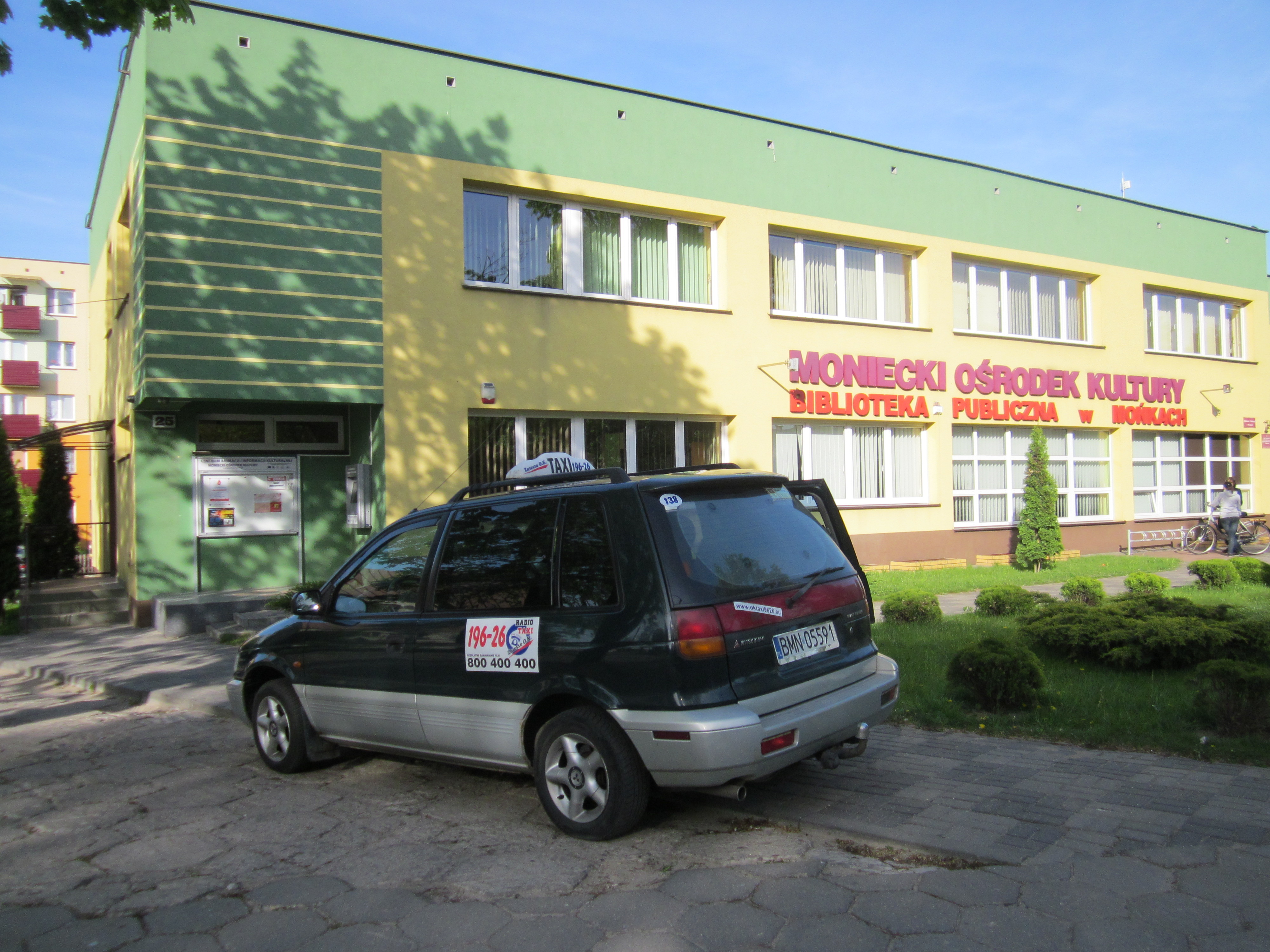 Taxi w Mońkach przy Domu Kultury